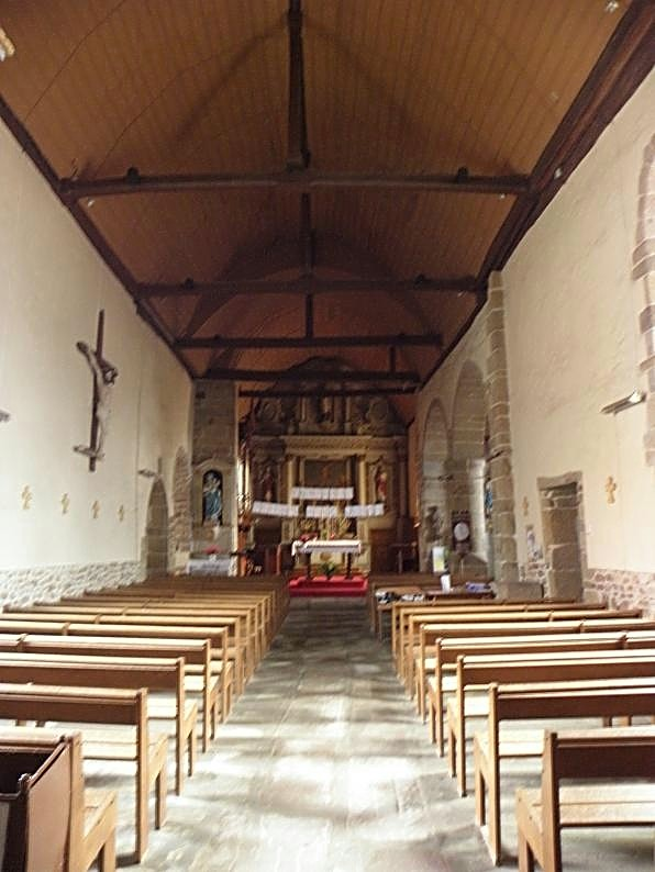 Intérieur de l'église Saint-Germain de Vieux-Vy-sur-Couesnon (35).